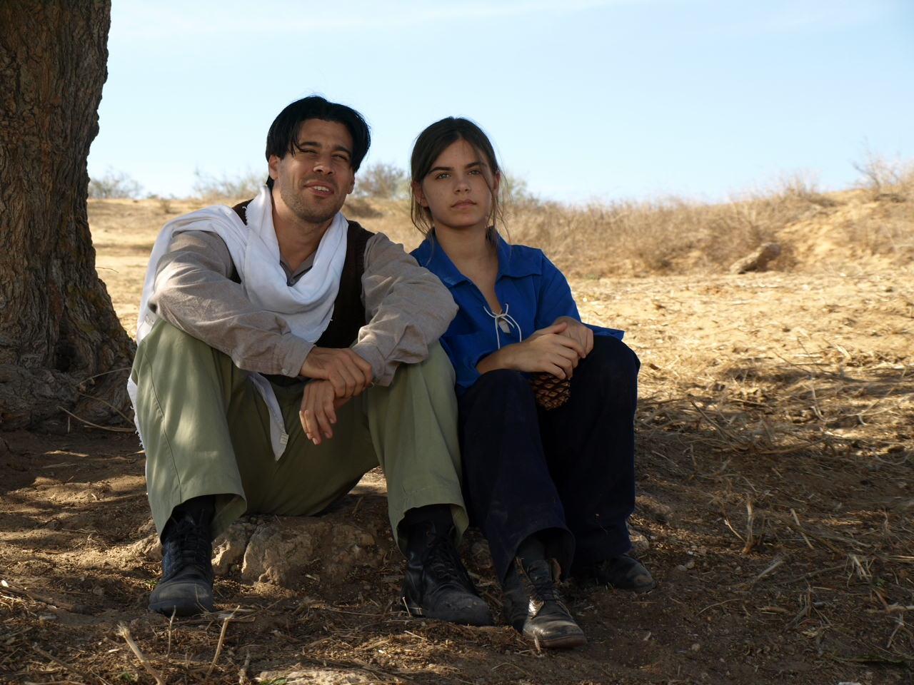 מתוך הסרט ברקיע החמישי